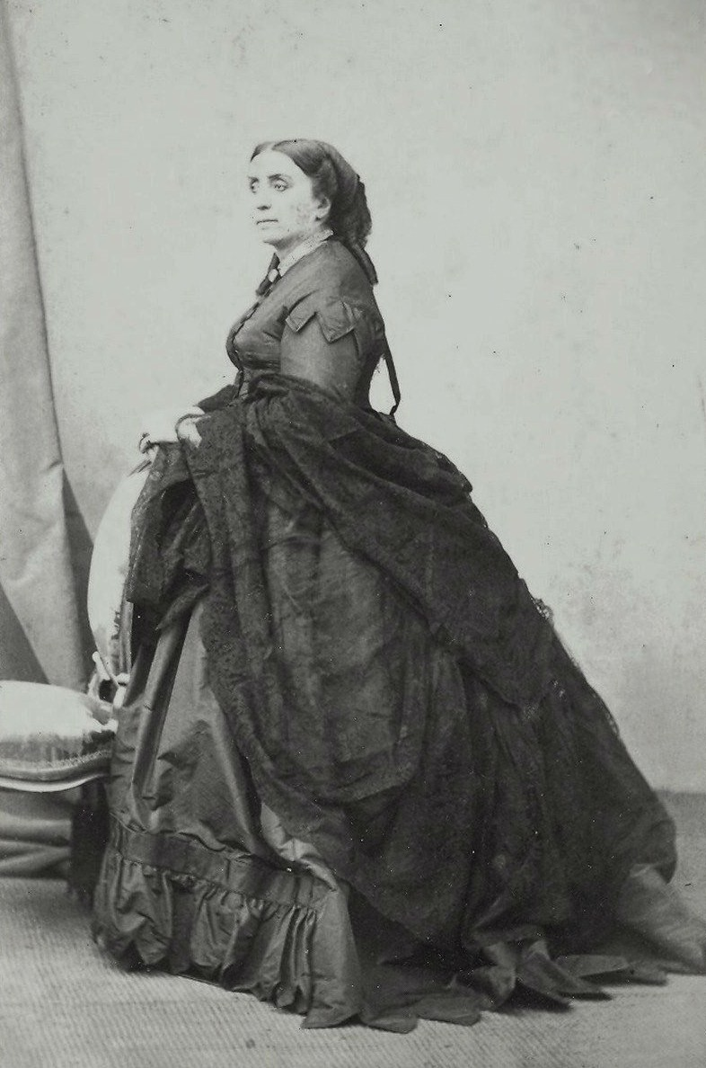 Софья Александровня Устинова, ур. Полянская (02.01.1808—1866).